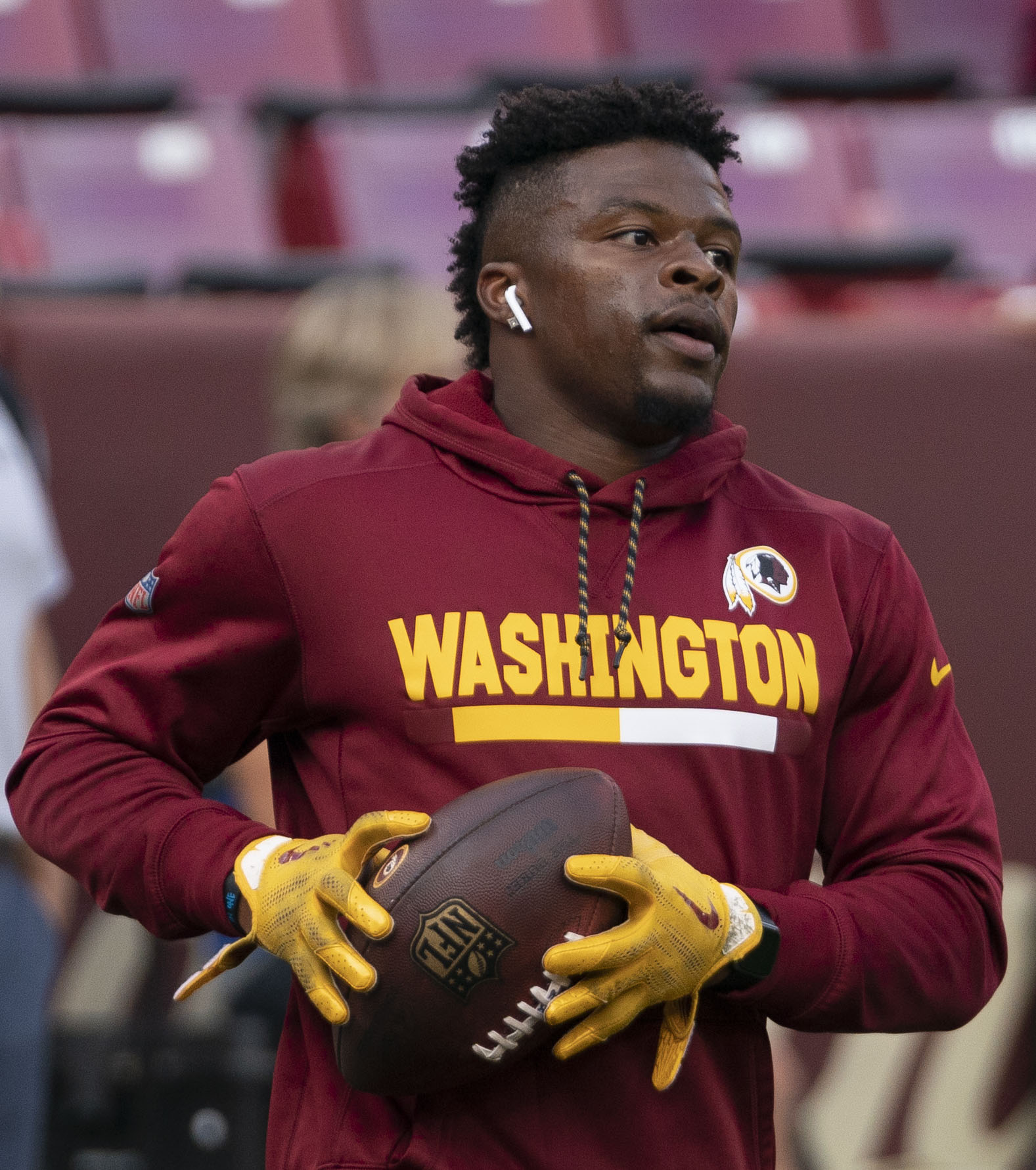 Jets at Redskins 8/16/18